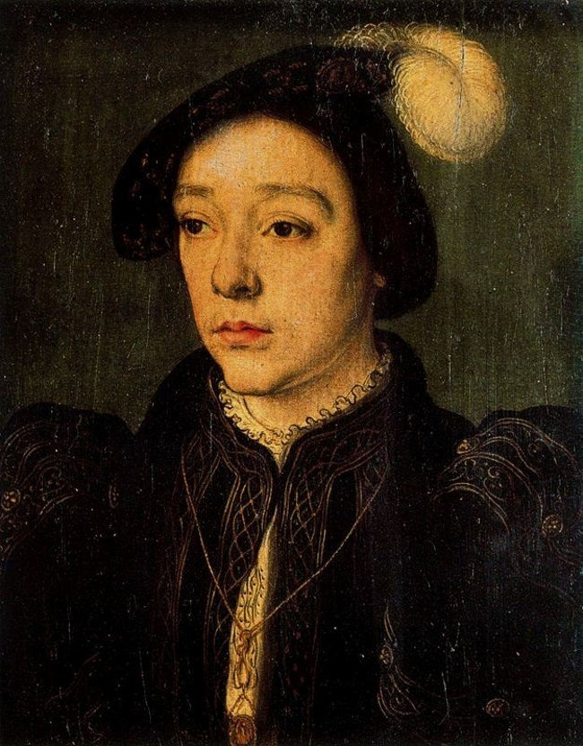 Portait réalisé sur peinture par Corneille de Lyon